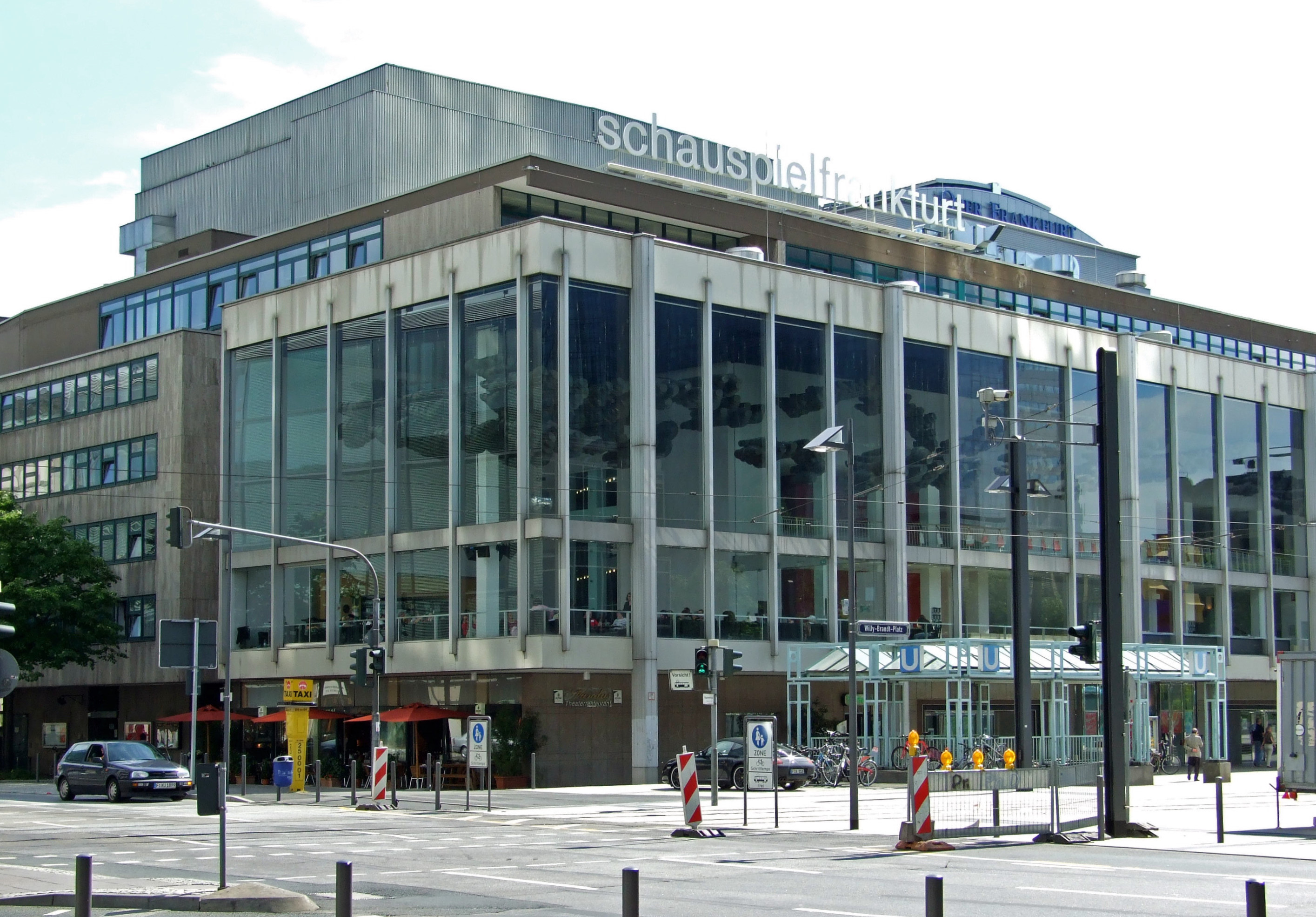 Schauspielhaus Ffm